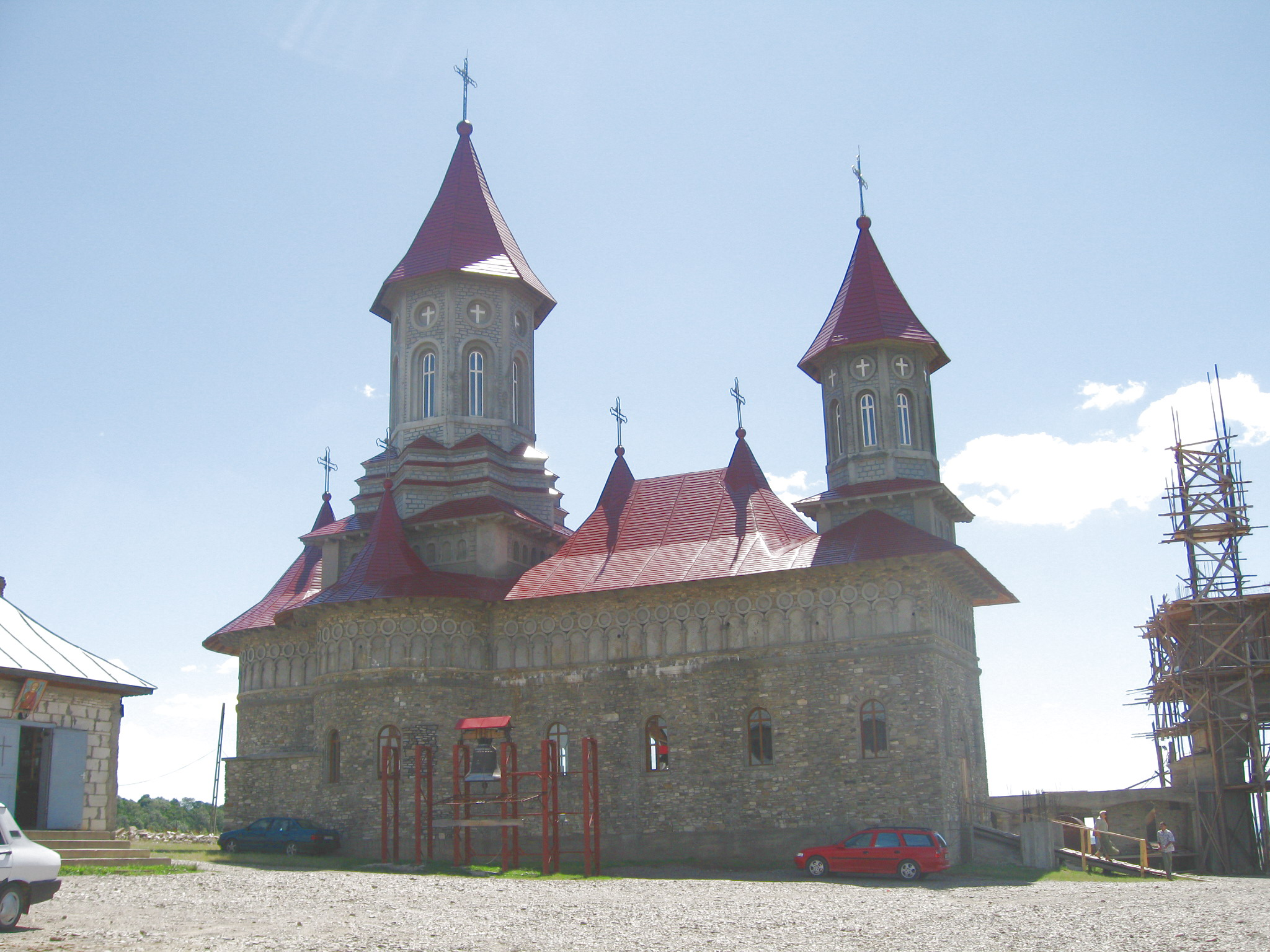 Mănăstirea Sf. Mina din Roşiori